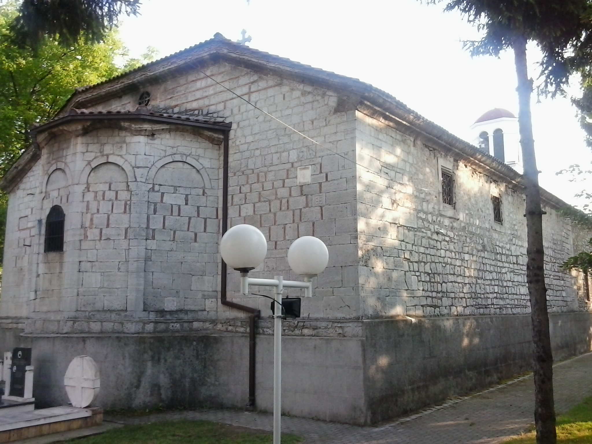 Struga